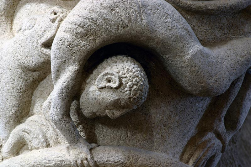 Détail d'un chapiteau de l'église d'Anzy-le-Duc